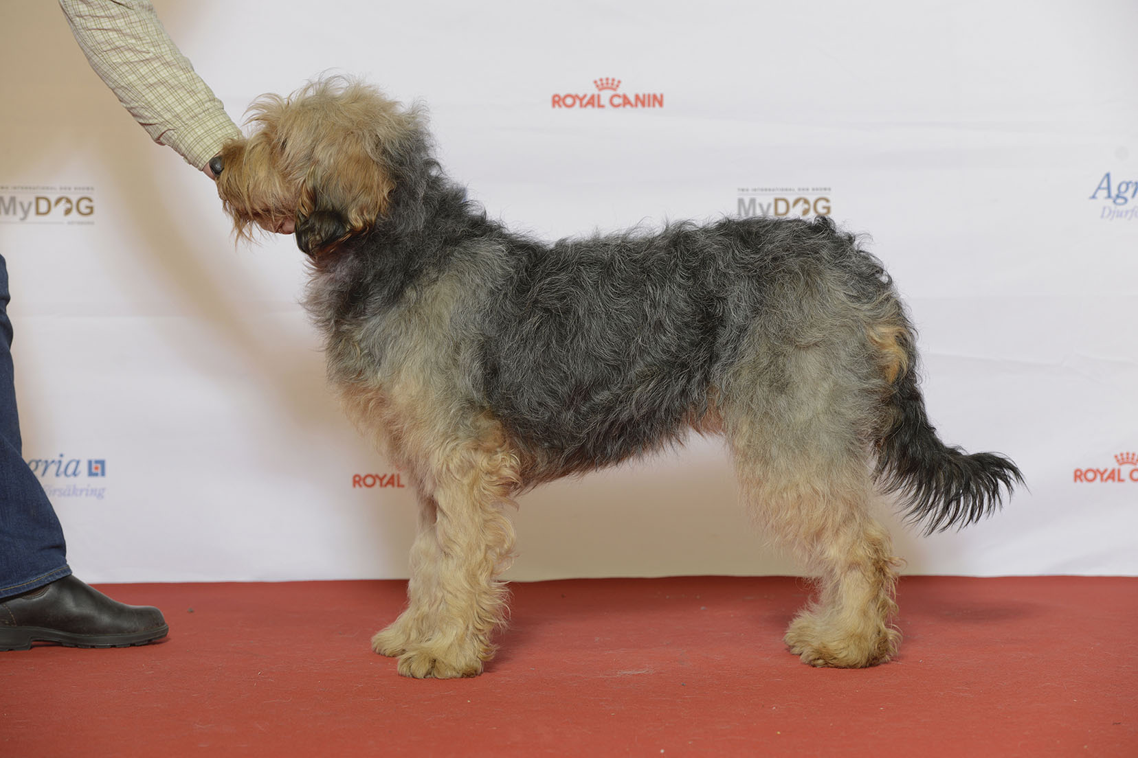 BIR Grupp 6 BOSANSKI OSTRODLAKI GONIC-BARAK Sandy MyDOG, Nordens största hundevenemang